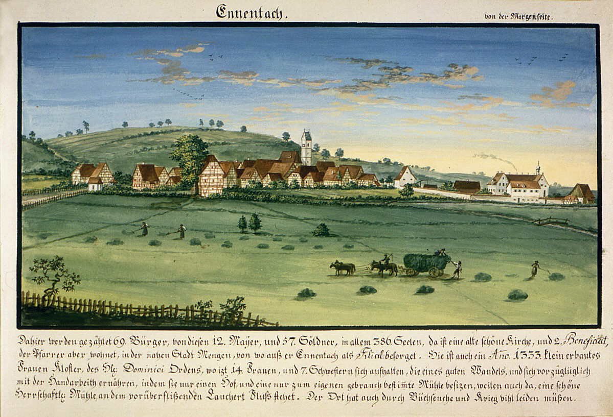 Ennetach mit Dominikanerinnenkloster Ennetach. Aquarell von N . Hug, 1805. Inschrift der Karte: Ennetach von der Morgenseite. Daher werden gezählt 69. Bürger, von diesen 12. Maijer, und 57. Söldner in allem 386 Seelen, da ist eine alte schöne Kirche, und 2. Beneficiat, der Pfarrer aber wohnet, in der nahen Stadt Mengen, von wo auß er Ennetach als Filial besorget. Hie ist auch ein Anno 1333. klein erbautes Frauen Kloster des Hlg. Dominici Ordens, wo ißt 14. Frauen, und 7. Schwestern sich aufhalten, die eines guten Wandels, und sich vorzüglich mit der Handarbeith ernähren, indem sie nur einen Hof, und eine nur zum eigenen Gebrauch bestimmte Mühle besitzen, weilen auch da, eine schöne Herrschaftl. Mühle, an dem vorüberfließenden Lauchert Fluß stehet. Der Ort hat auch durch Büchseuche und Krieg vihl leiden müßen.